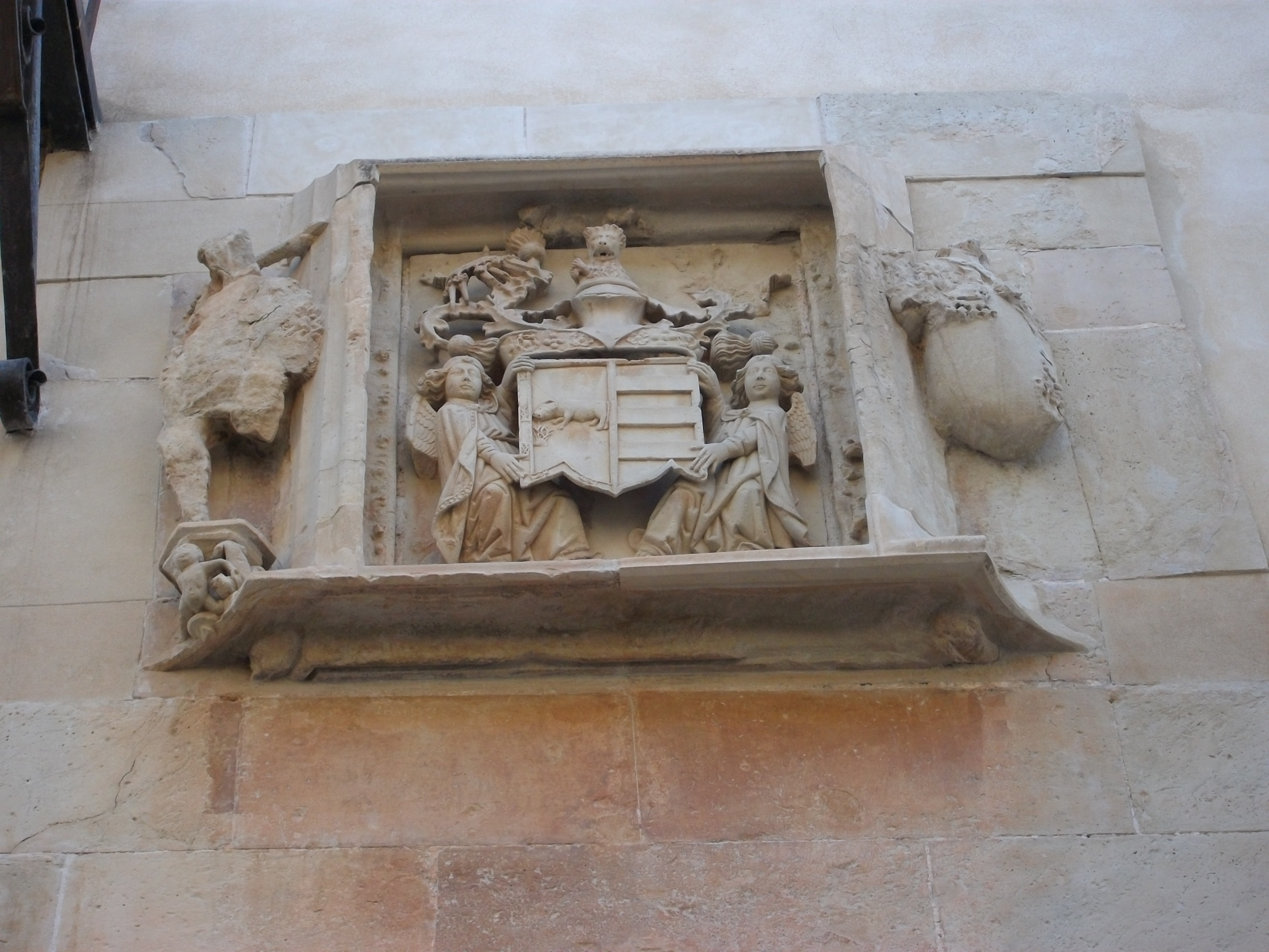 Escut de la família Borja sobre a l'entrada del Palau Ducal de Gandia.